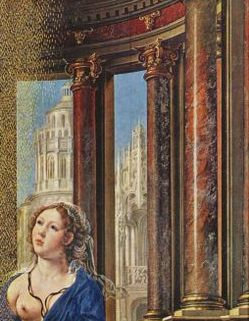 Danae